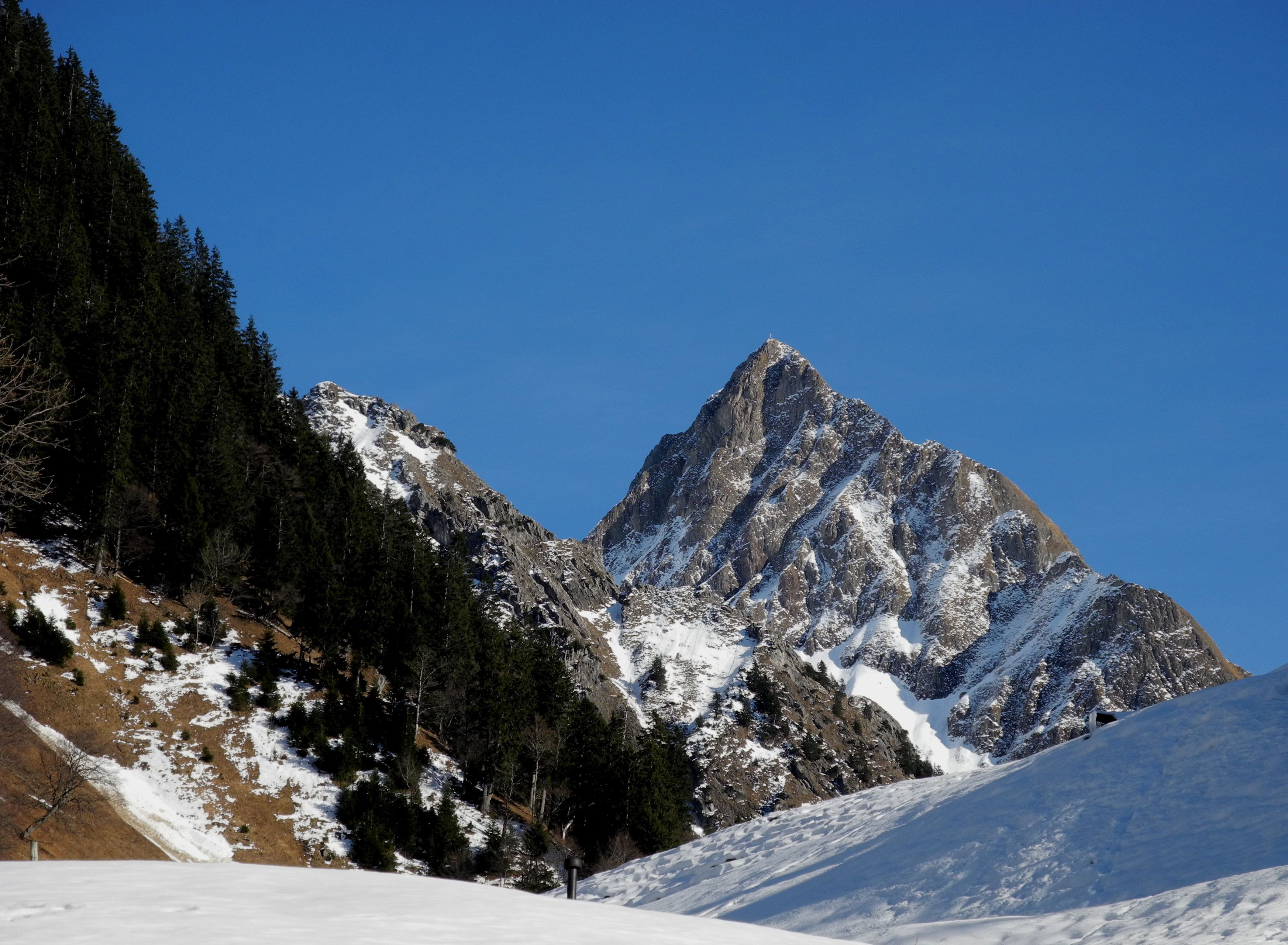 Oberstdorf - Höfats-Westgipfel (2259 m) von Gerstruben